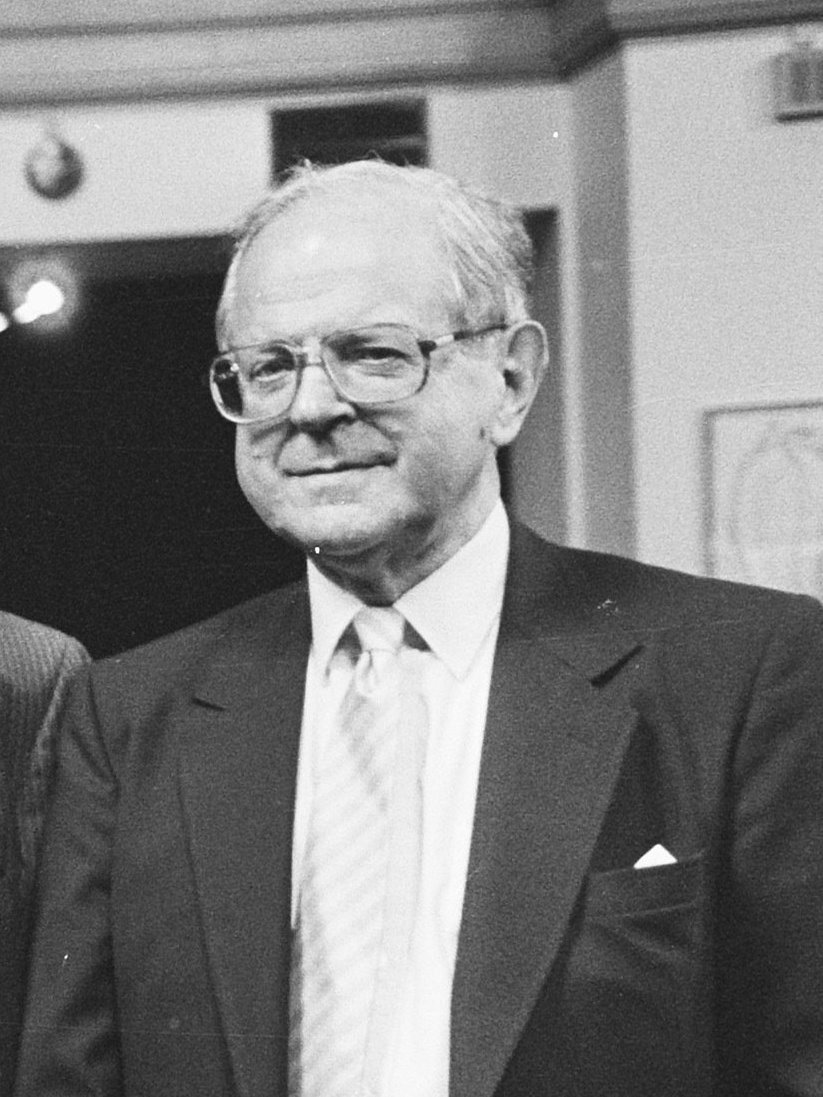 Robert Conquest en el Congreso Sacharov de 1987 (Amsterdam, Países Bajos)